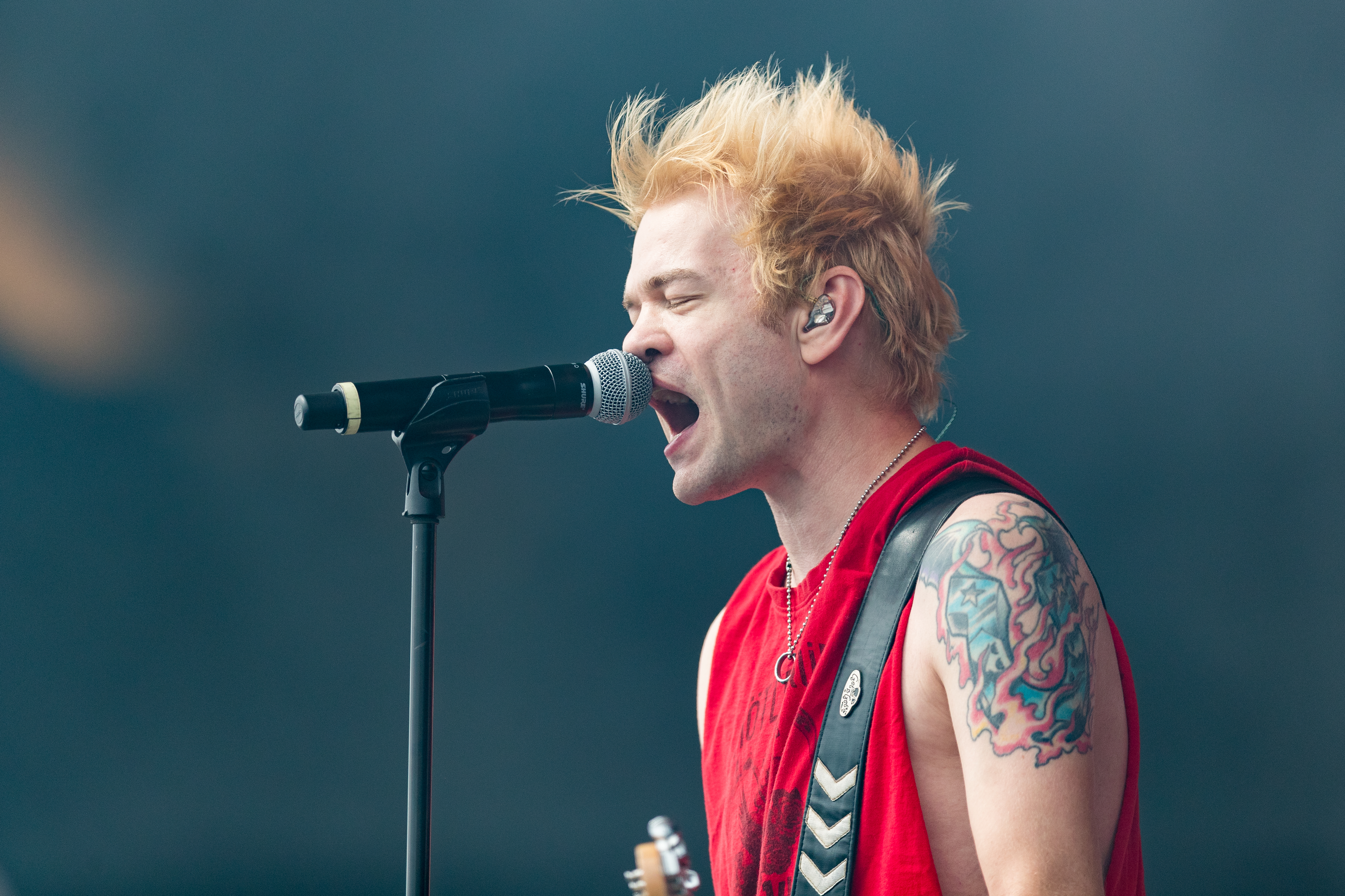 Sum 41 during Rock am Ring at Nürburgring, Nürburg, Rheinland Pfalz, Germany on 2017-06-03, Photo: Sven Mandel